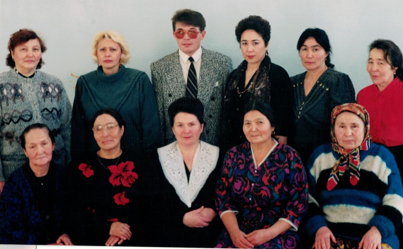 Выпускники Зуякской школы с учителями. Белорецкий район.